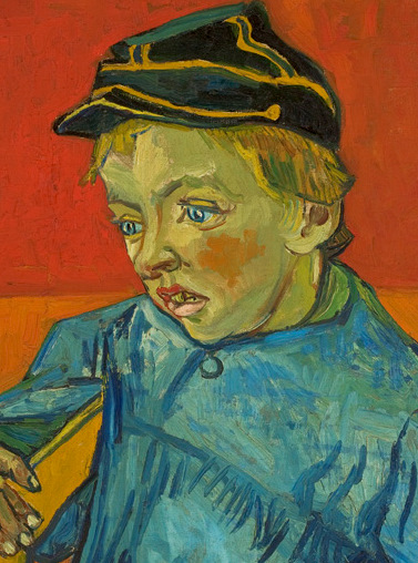 Detalhe de O Escolar (Gamin au Képi), de Vincent van Gogh (1853-1890). Acervo do Museu de Arte de São Paulo, São Paulo, Brasil.